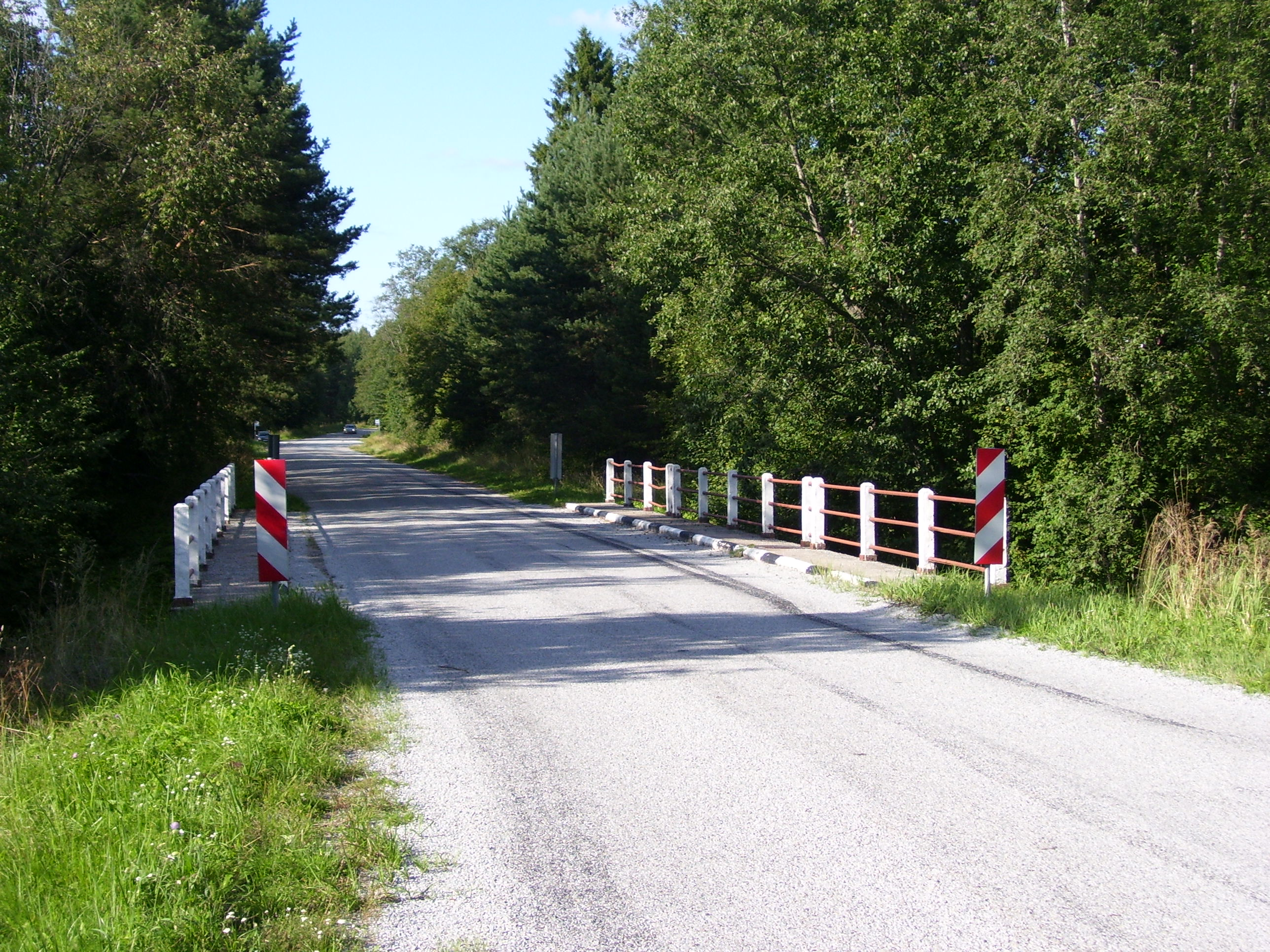 Sild üle Pudisoo jõe Pudisoo külas (Kuusalu-Leesi tee, vaade Leesi poole)